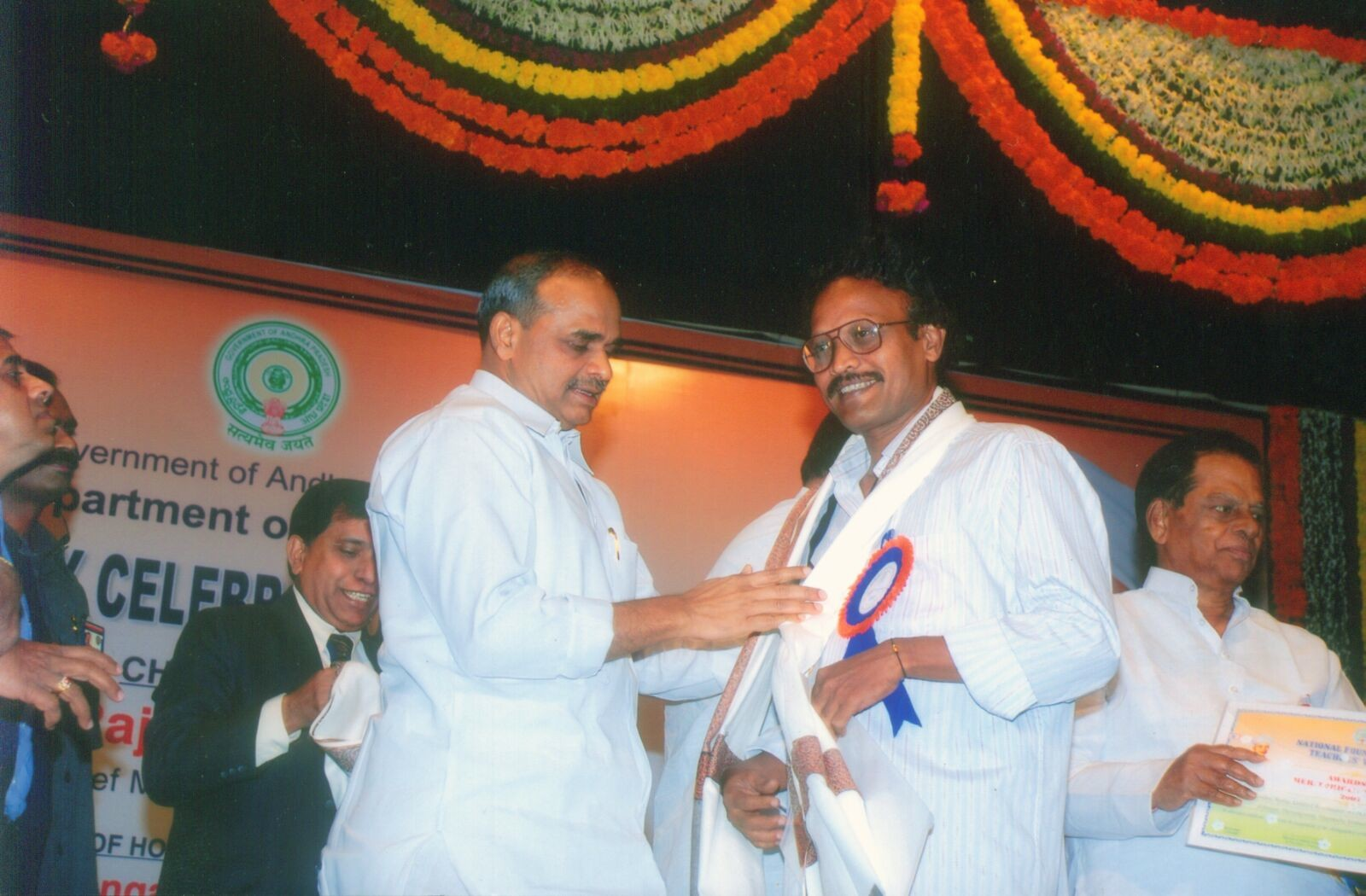 2007 లో ఆంధ్ర ప్రదేశ్ రాష్ట్ర ఉత్తమ ఉపాధ్యాయునిగా వై.ఎస్.రాజశేఖరరెడ్డి ద్వారా సన్మానం